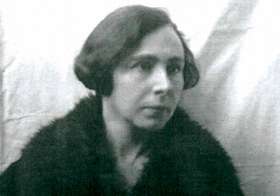 Mrs. von Ratlef